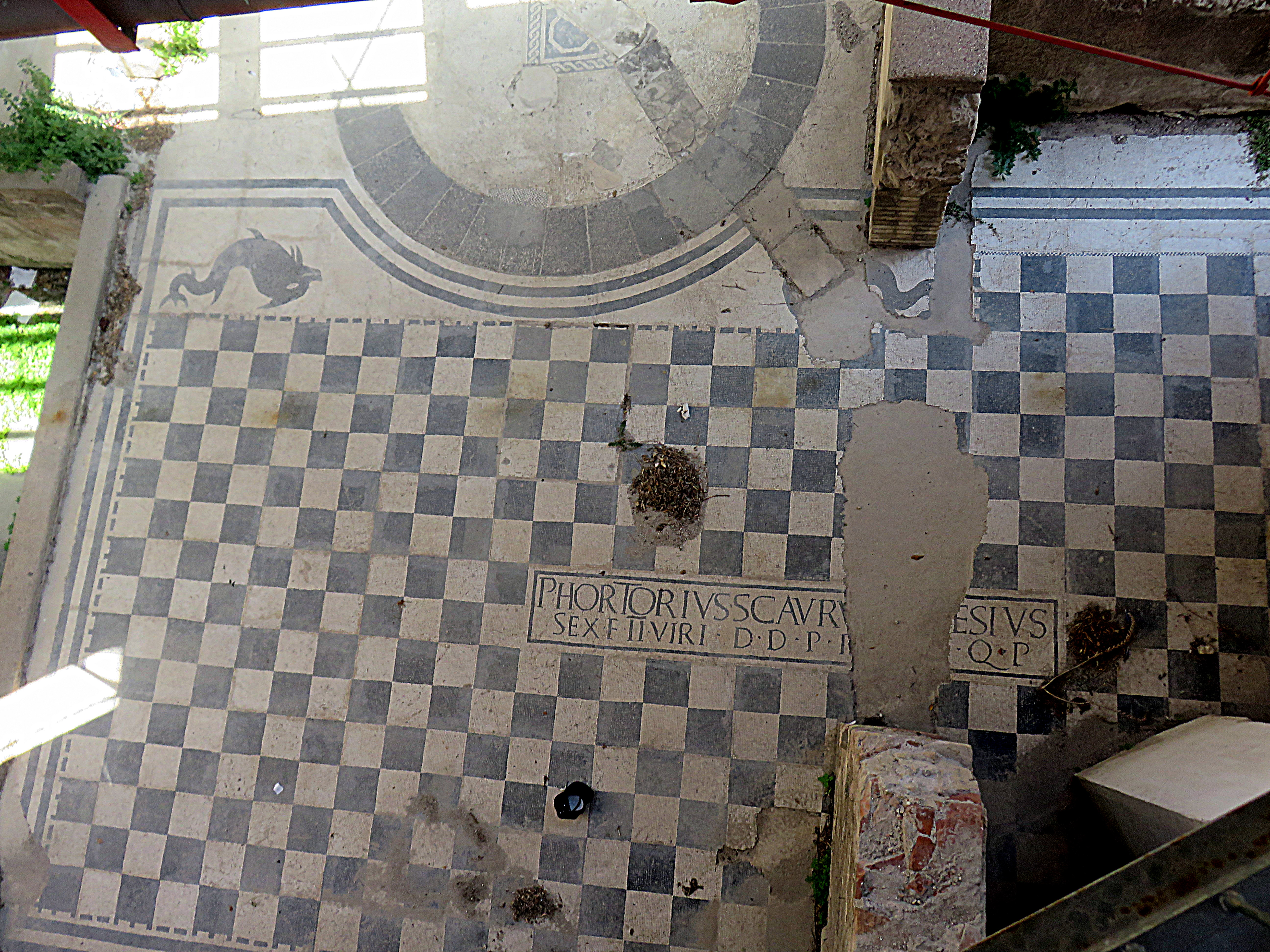 Arco di Traiano di Ancona - area archeologica circostante